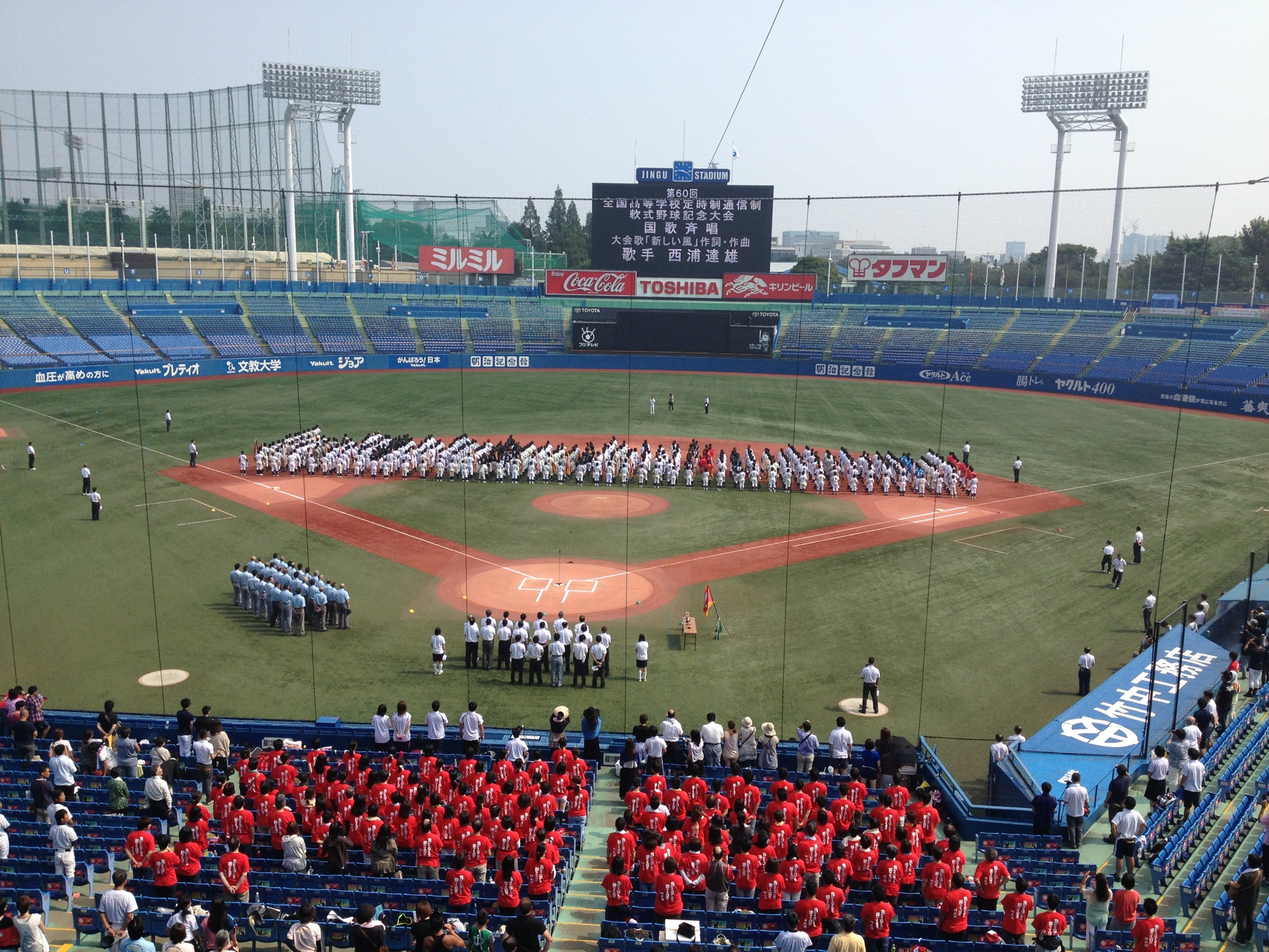 開会式の様子です